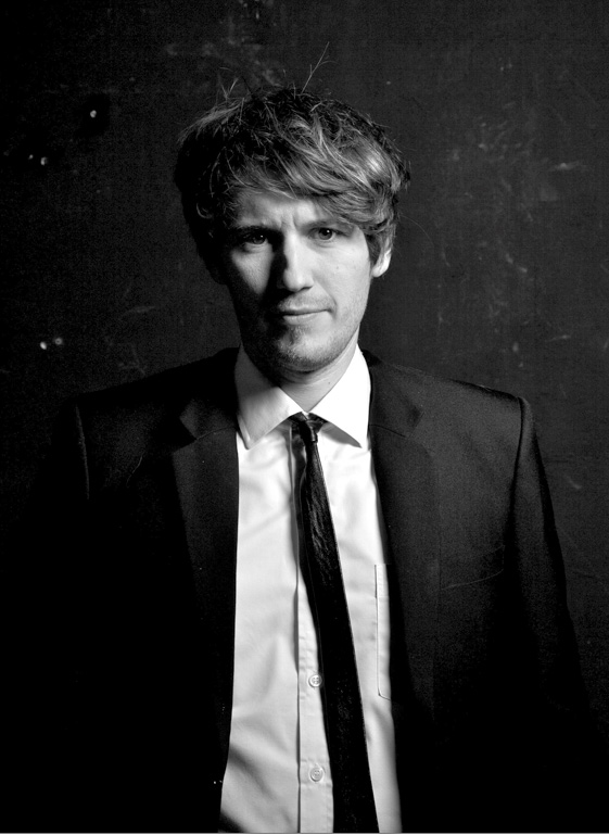 Autor Robert Nippoldt